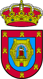 Ciudad Real coat